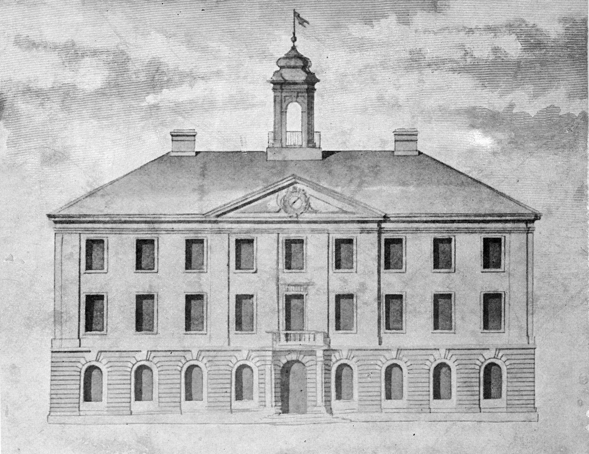 Rådhuset. Ritning till "stadshus" / rådhus i Gävle 1782; finnes signerad av Carl Fredrik Adelcrantz och aproberad (antagen) av Gustav III.